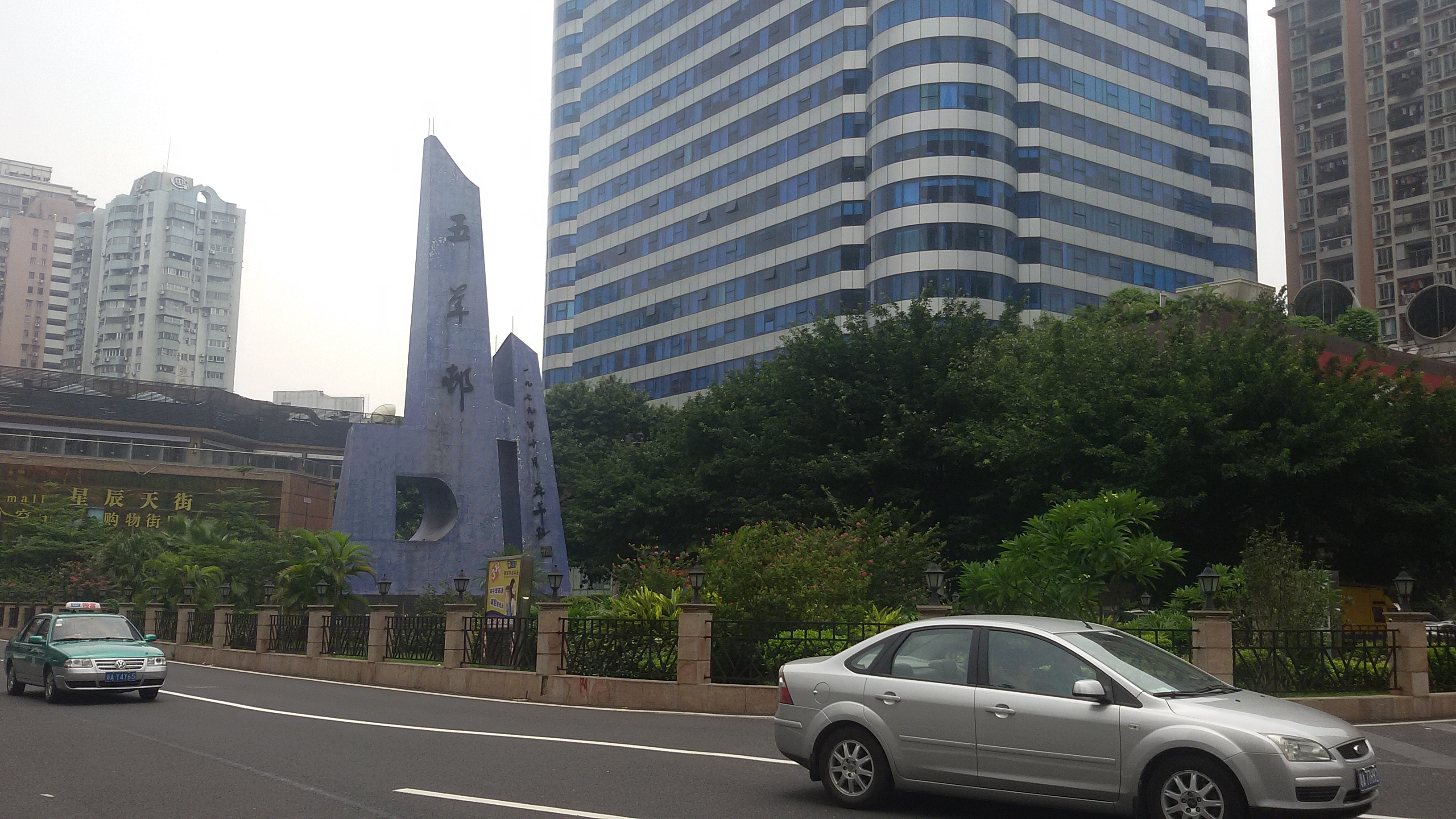 粵語: 五羊新城嘅紀念石（喺寺右新馬路嗰邊）